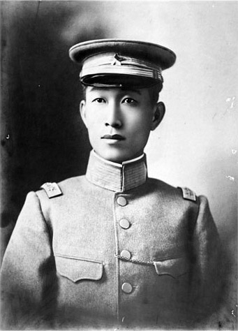 蔡锷